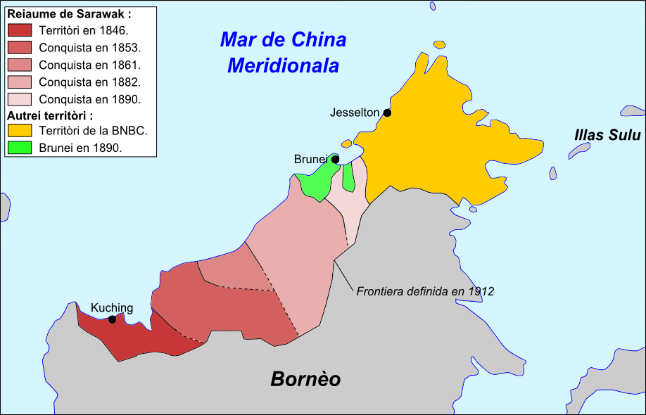 Colonizacion dau nòrd de Bornèo.